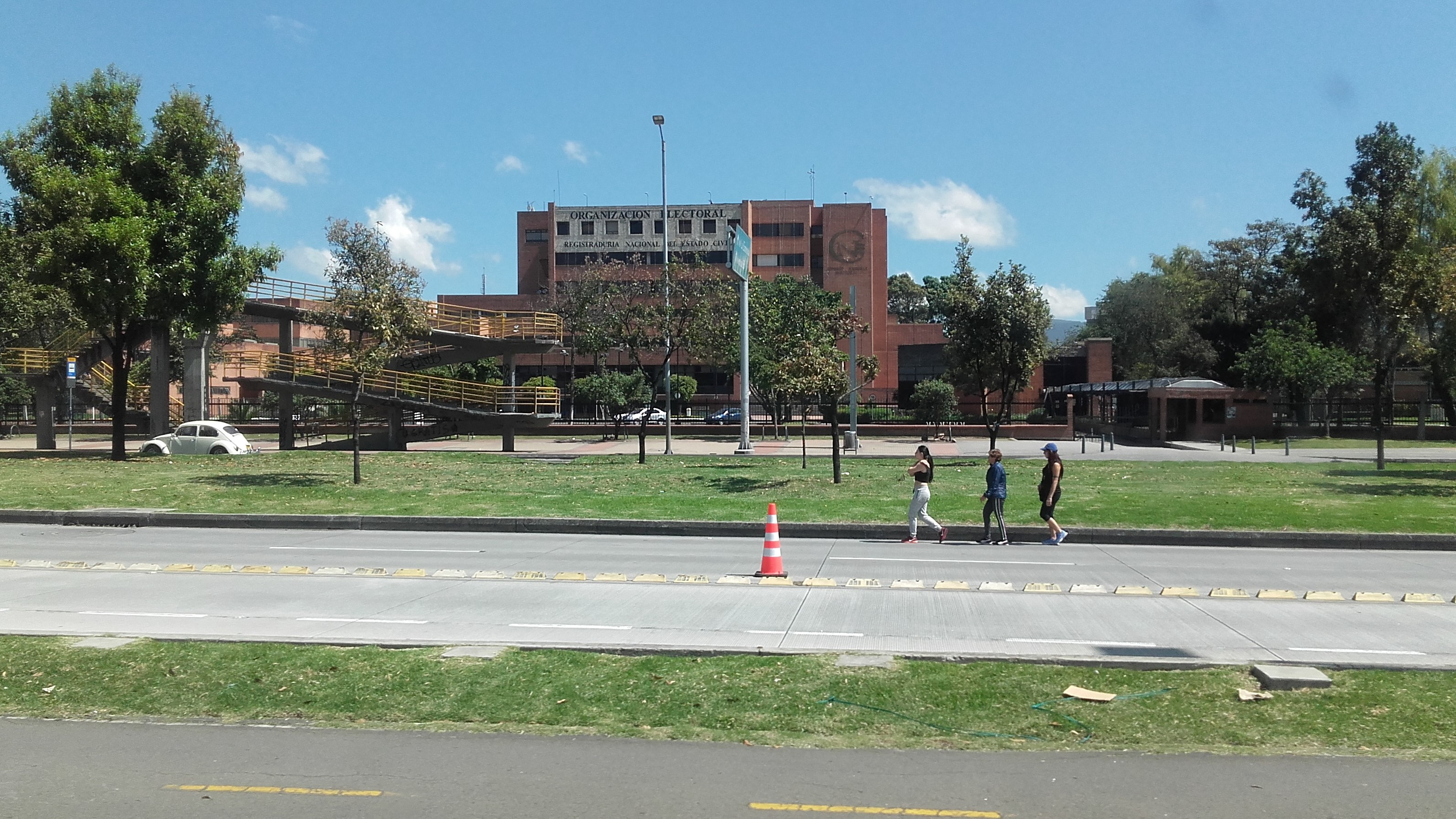 dnmemdmdmfmfnnfnfnfn